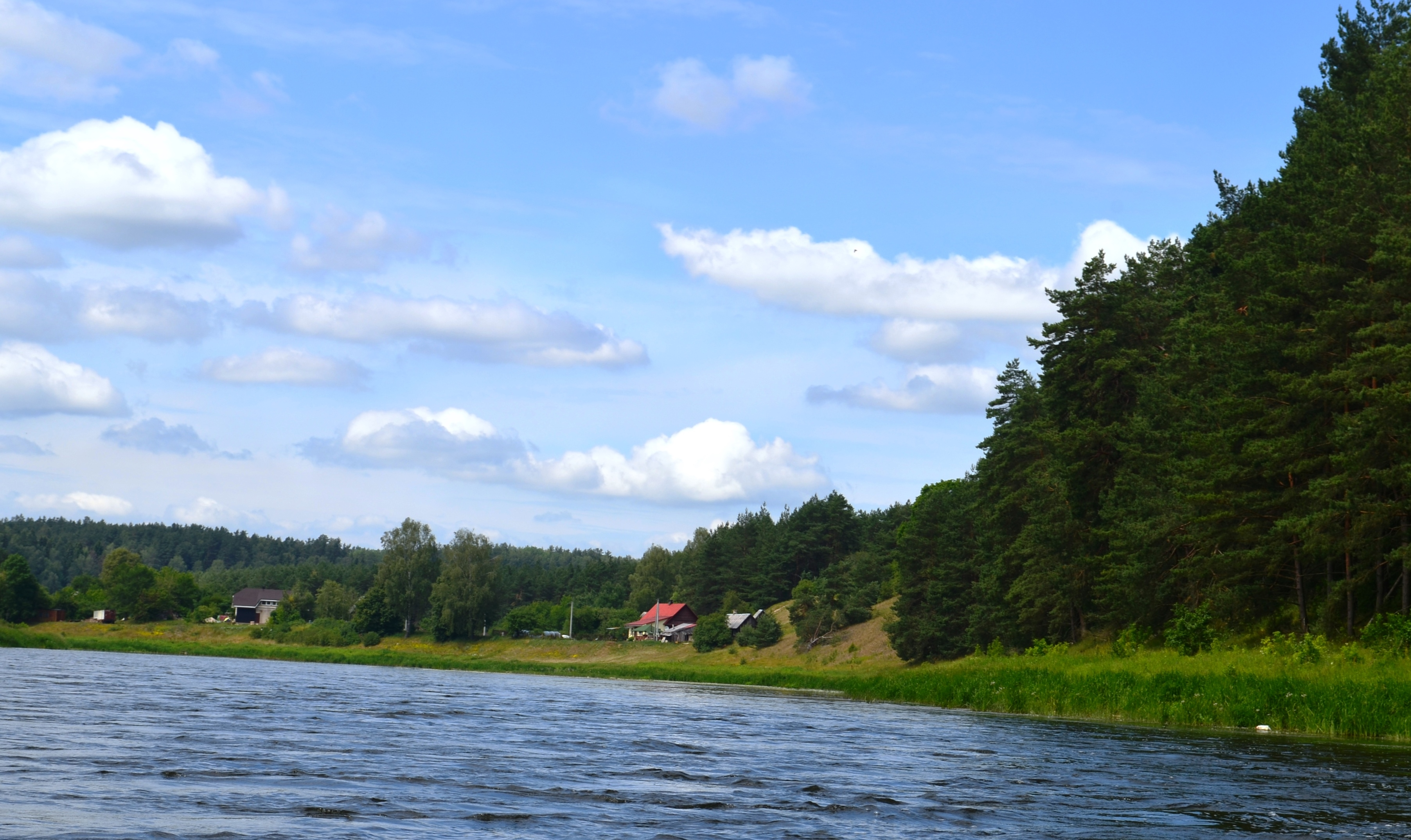 Šiurmonys, Vilniaus raj.